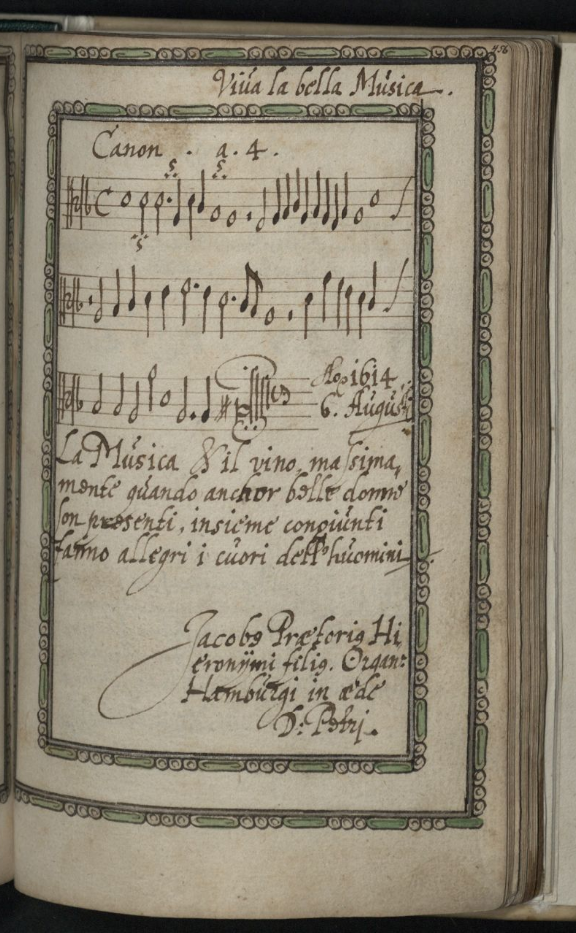 Eintrag von Jacob Praetorius der Jüngere im Stammbuch des David von Mandelsloh mit autographem Kanon "Viva la bella Musica"